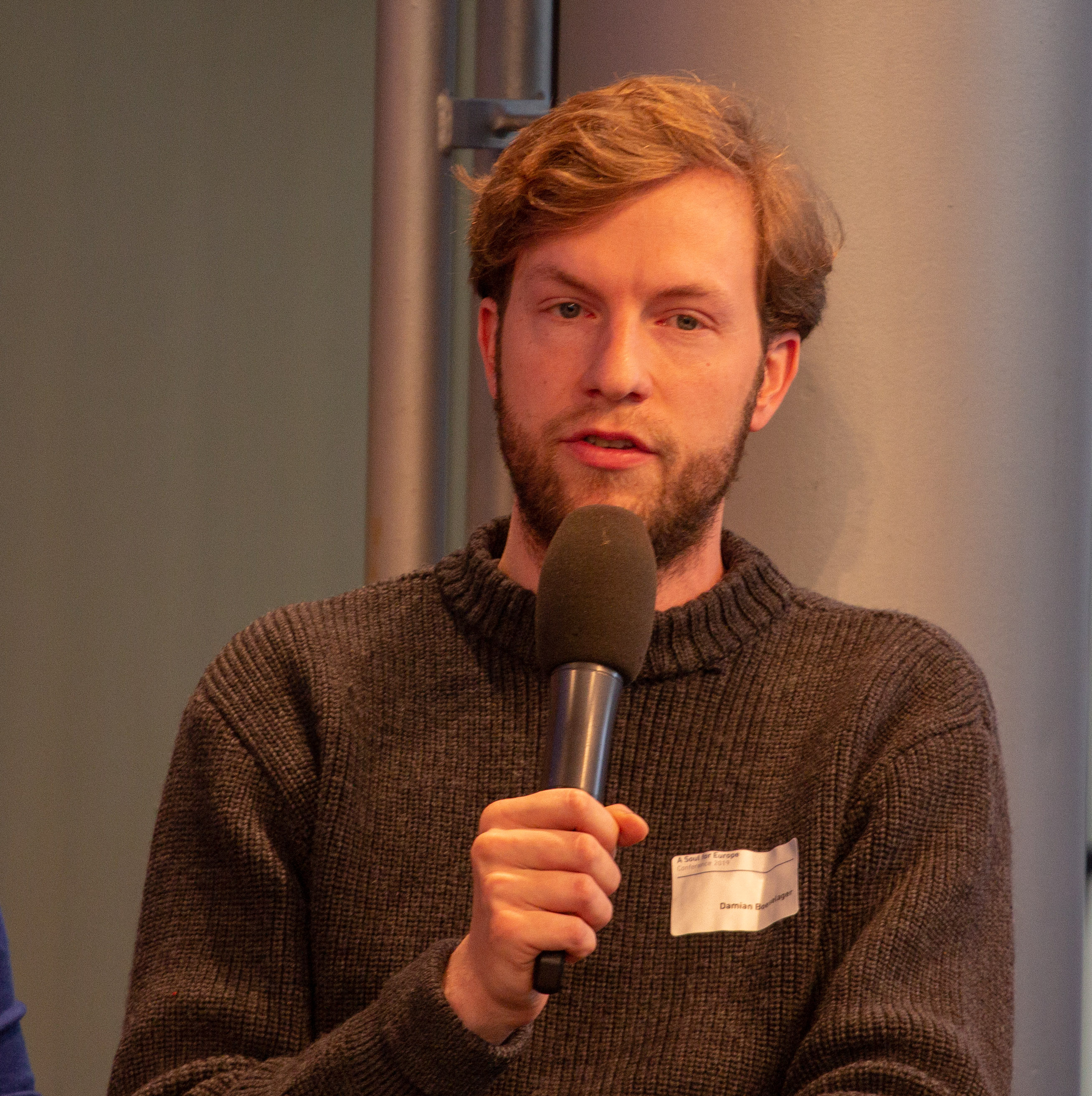 Veranstaltung "A Soul for Europe" am 13. April 2019 in der Akademie der Künste in Berlin. Representatives of European Parties: Carl Grouwet (ALDE), Damian Boeselager (Volt), Hannah Neumann (Bündnis 90/Die Grünen), Violeta Tomic (European Left), Yanis Varoufakis (DIEM25), Elmar Brok (MEP European People’s Party). With: Tanja Dückers, Noémi Kiss, Katja Sinko, Kathrin Röggla and Mia Florentine Weiss. Intervention by Volker Schlöndorff and Hannes Swoboda (former MEP). Moderation: Volker Hassemer